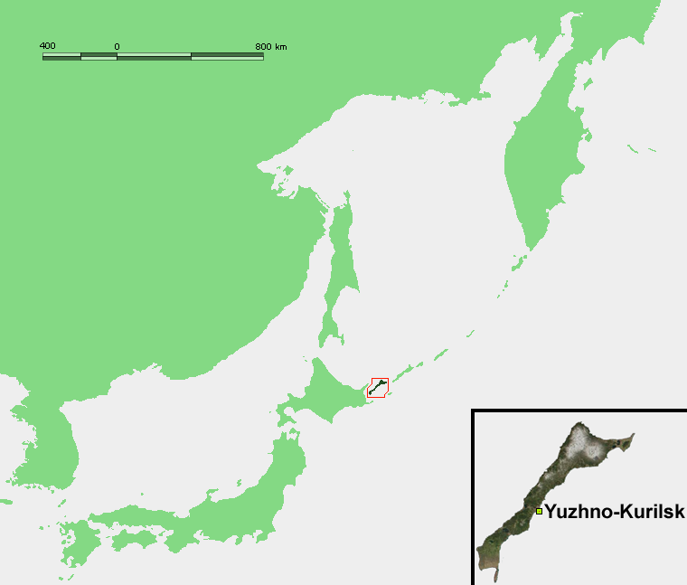 Isla Kunashir y la localización de Yuzhno-Kurilsk. He usado Image:Okhotsk-Japan5ION.png y Image:Kunashir.jpg